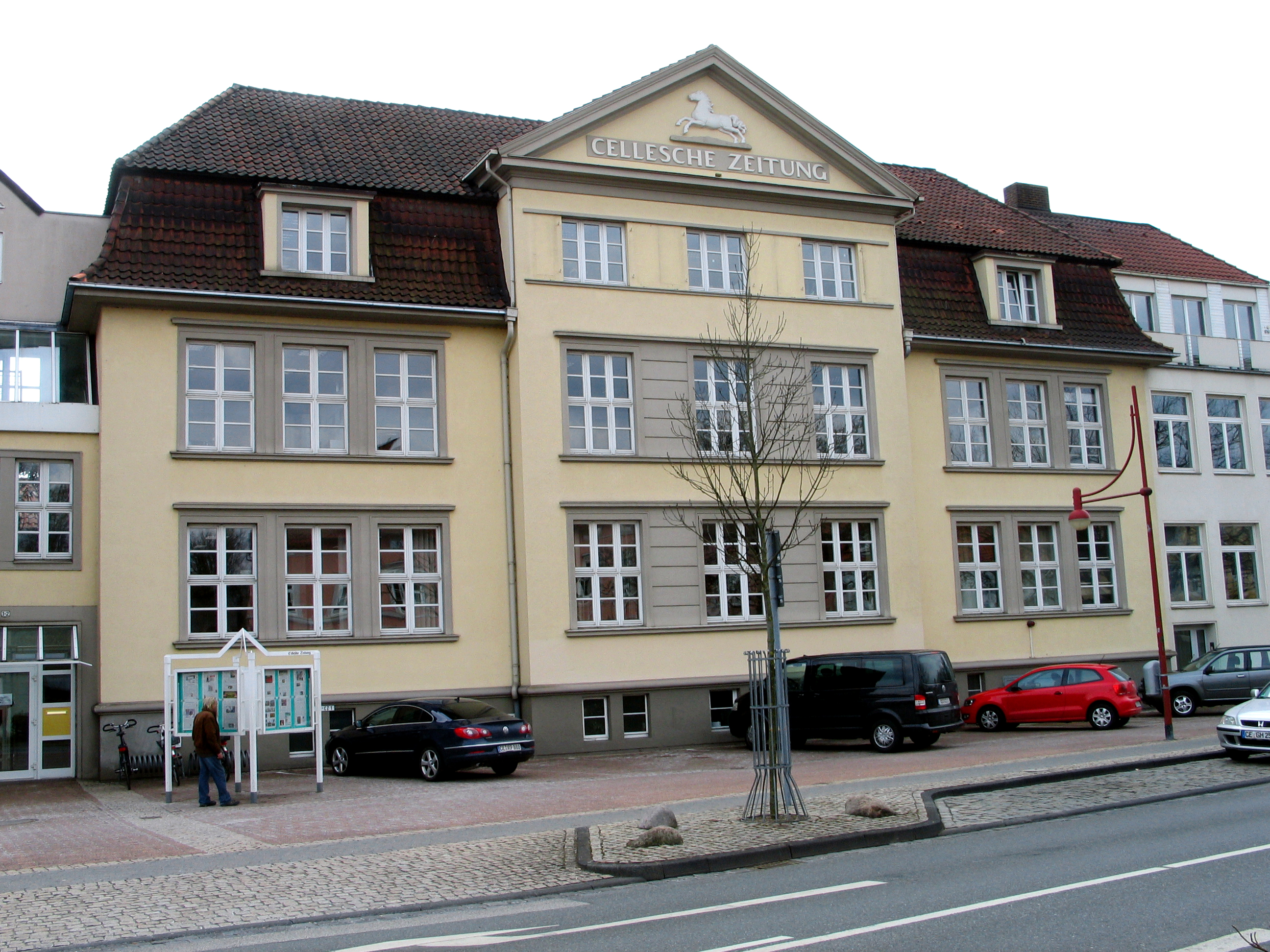 Eines von mehreren Gebäuden der Celleschen Zeitung, hier in der Bahnhofstraße 1-3 in Celle ...